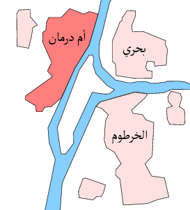 خريطة توضح موقع كل من الخرطوم وأم درمان وبحري في السودان